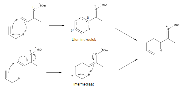 Lewise hapetega katalüüsitud een-reaktsioonide mehhanismid